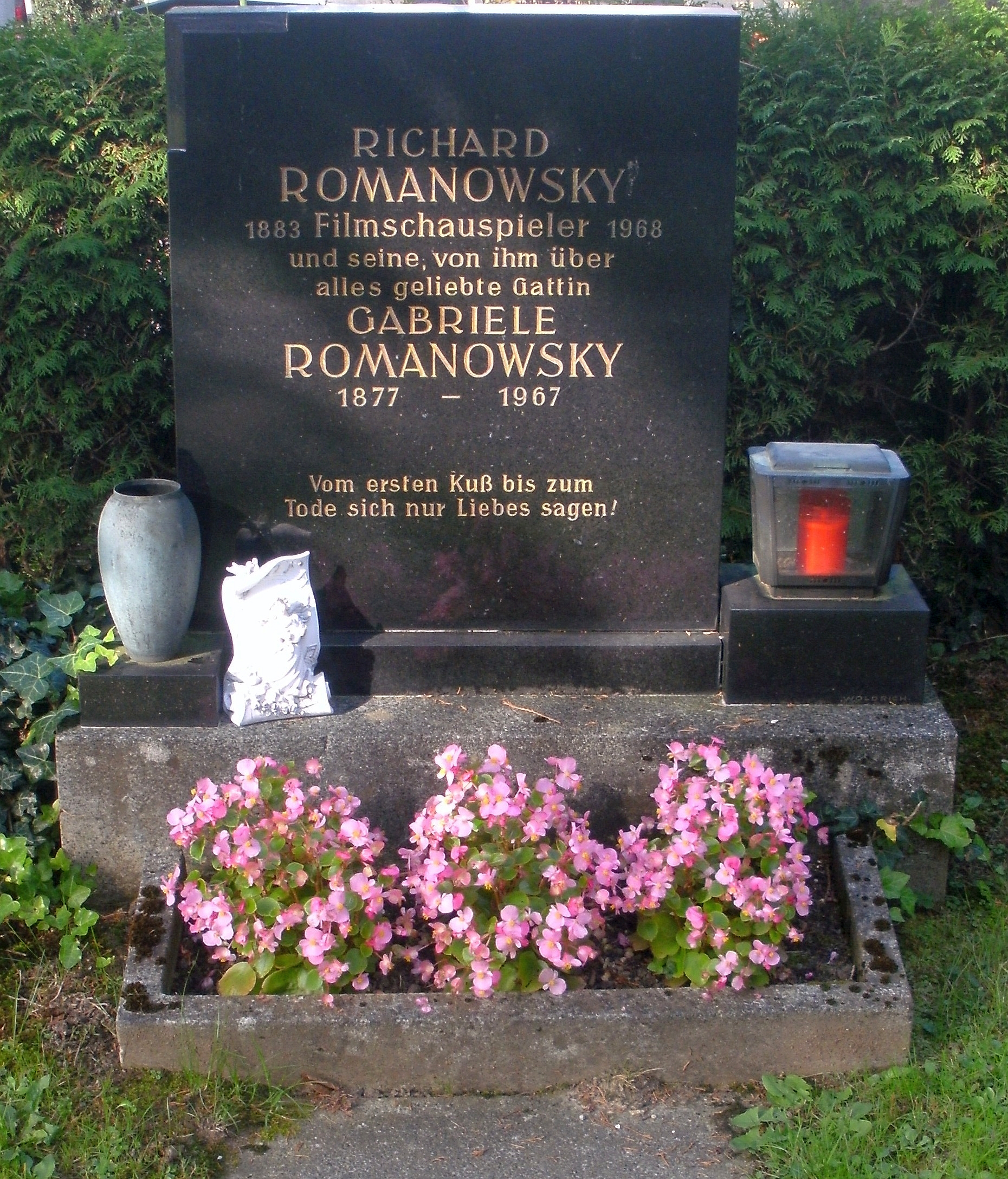 Steyr, Urnenfriedhof am Tabor: Grab des Schauspielers Richard Romanowsky (1883–1968)